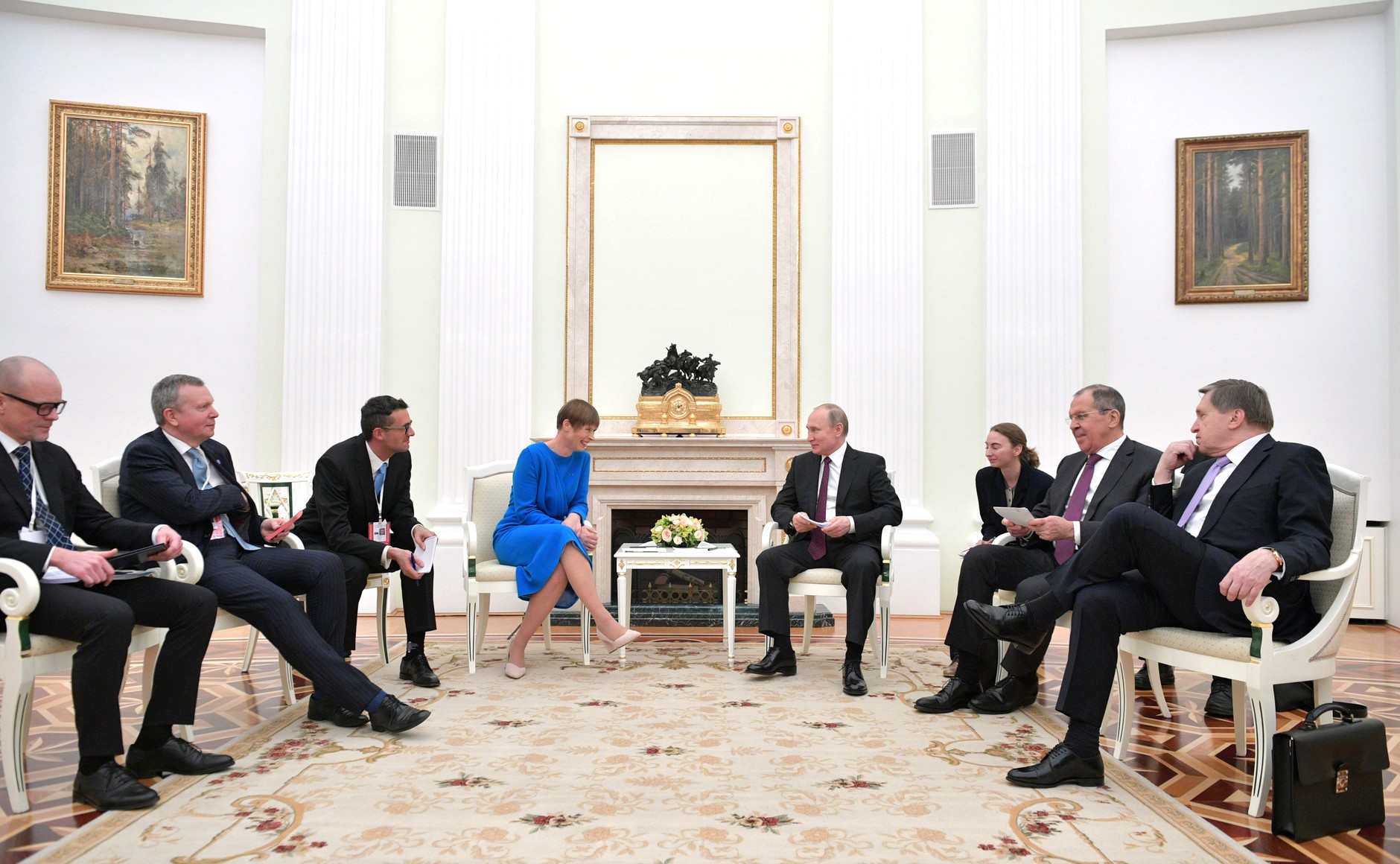 Встреча Президента Российской Федерации Владимира Путина с Президентом Эстонской Республики Керсти Кальюлайд